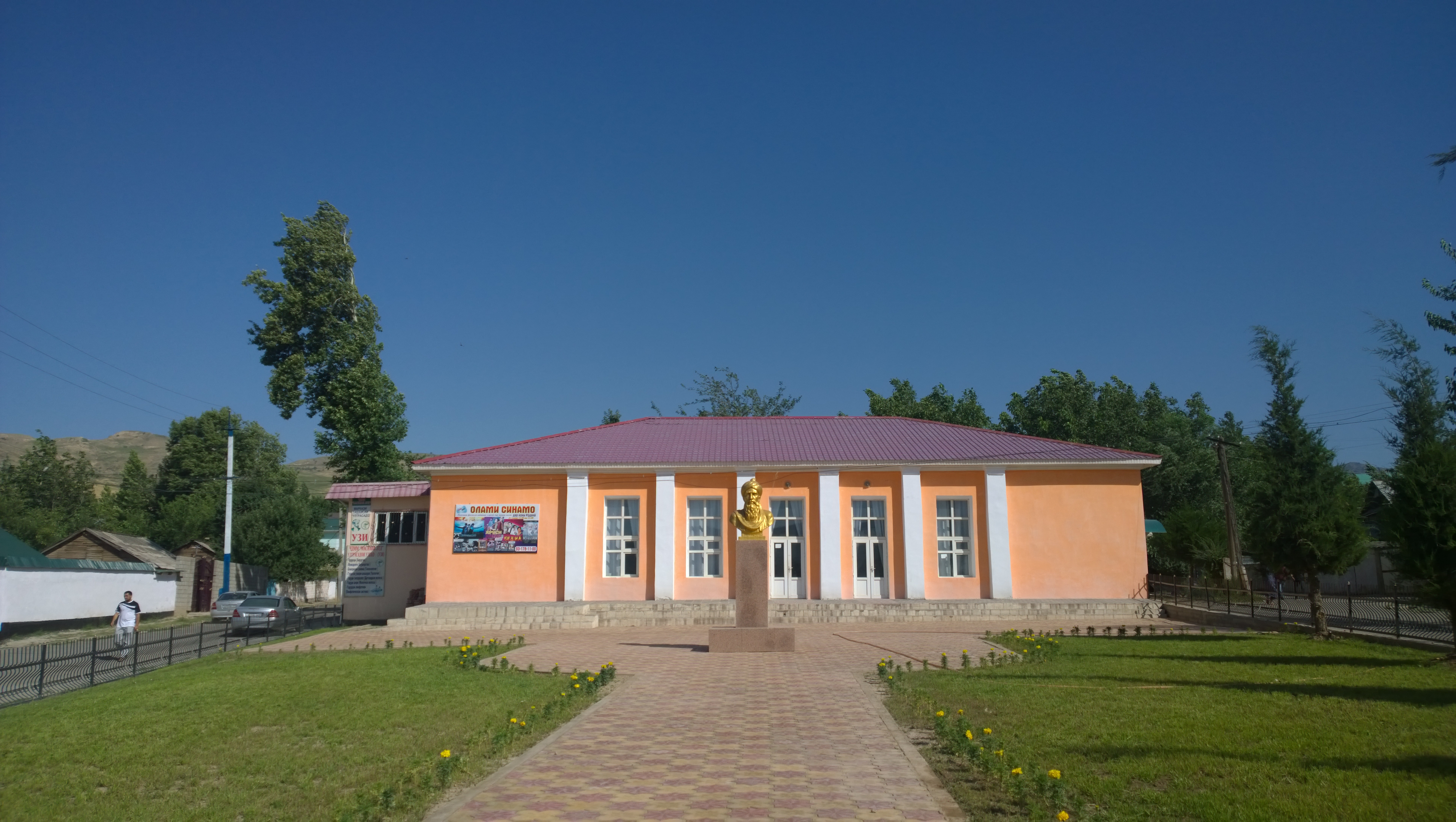 Тоҷикӣ: Кохи синамои ноҳияи Файзобод